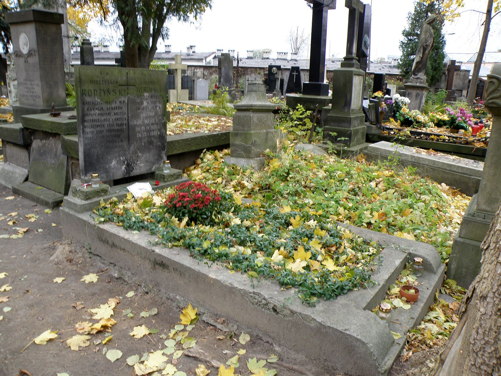 Mieczysław Rodzyński grób na Powązkach, kw. T